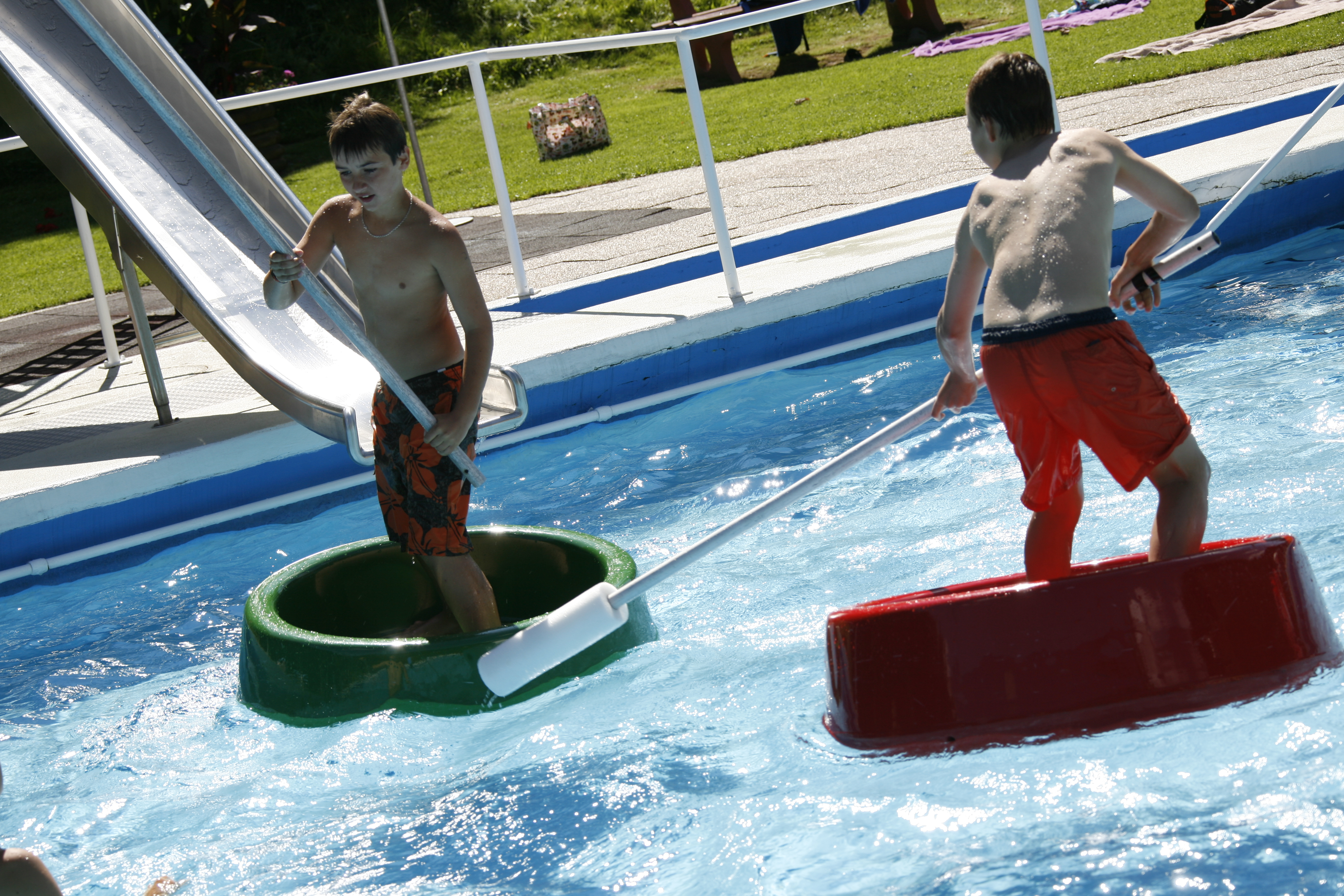 Spiel und Spaß im Freibad Bad Teinach